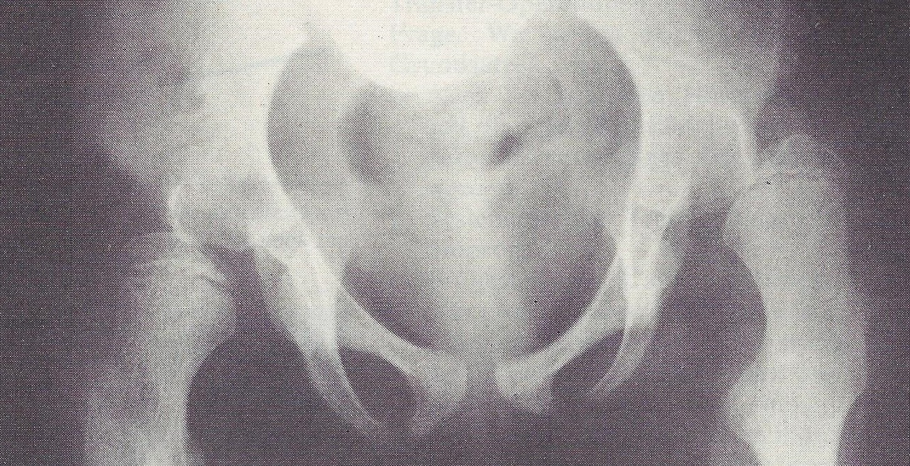 Hüften eines 7-jährigen Kindes mit thorakaler Myelomeningocele. Reflexaktivität in den gelähmten Segmenten hat zur Luxation beider Hüftgelenke geführt.